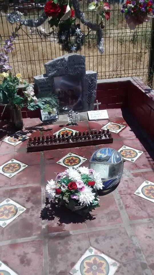 Animita en Calle Isabel Riquelme antes de calle Valdovinos.